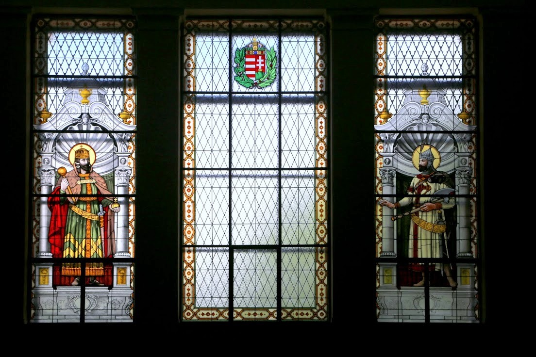 Magyar Királyi Honvéd Ludovika Akadémia, a kápolna ólom-üveg ablakai (Szent István és Szent László alakjaival), Szalay Tihamér (tervező), Lakiné Herczeg (üvegművész), 2015. május 30. (eredetileg: 1883)